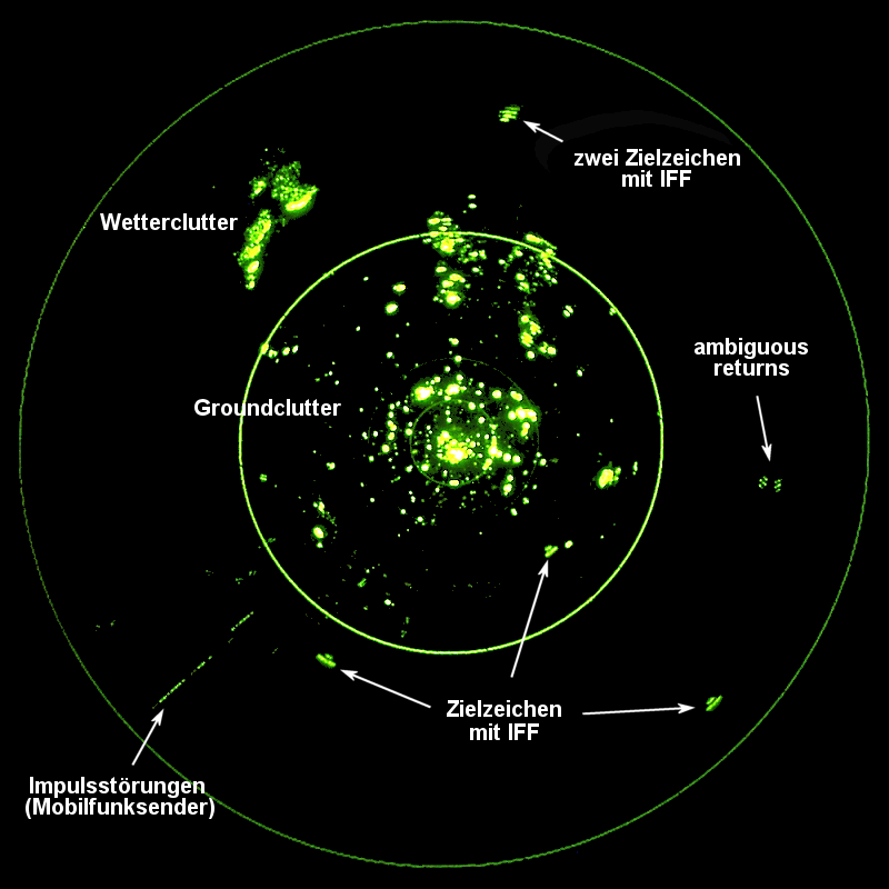 Verschiedene Störungen durch Clutter auf einem PPI-scope.